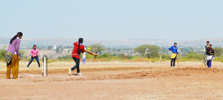 क्रीडा स्पर्धा चालू असताना